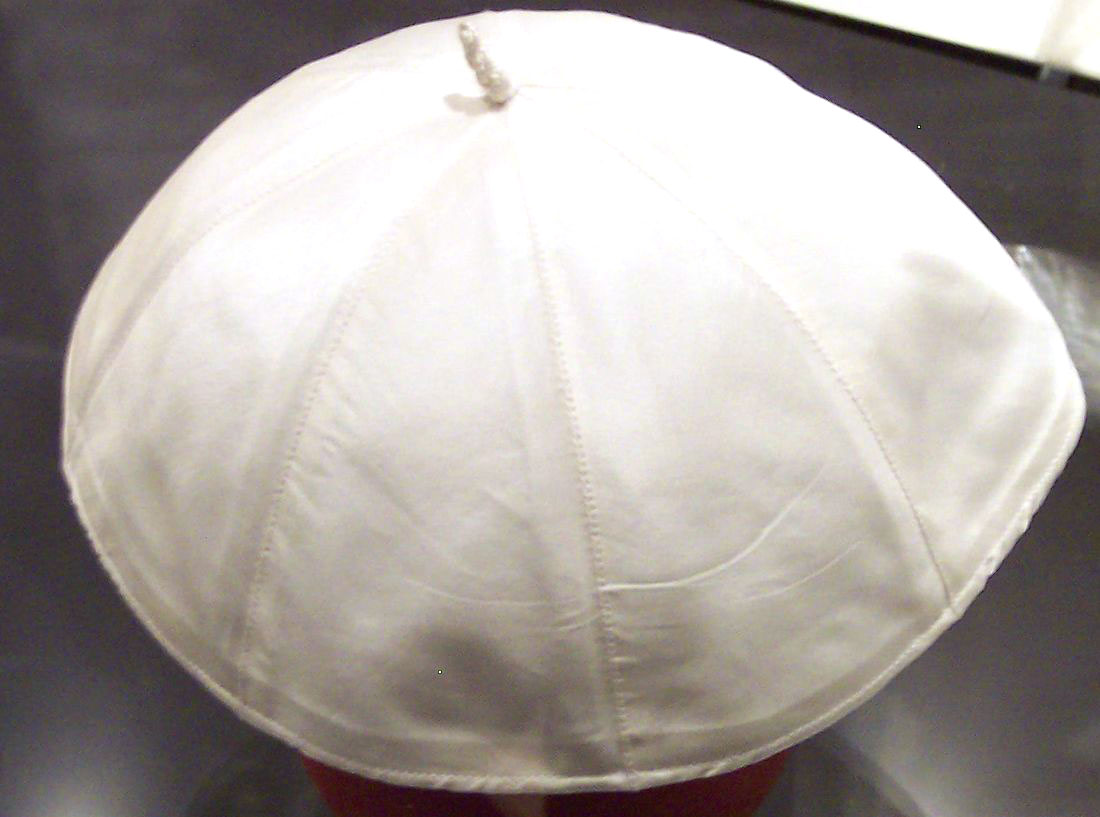 E Pileolus